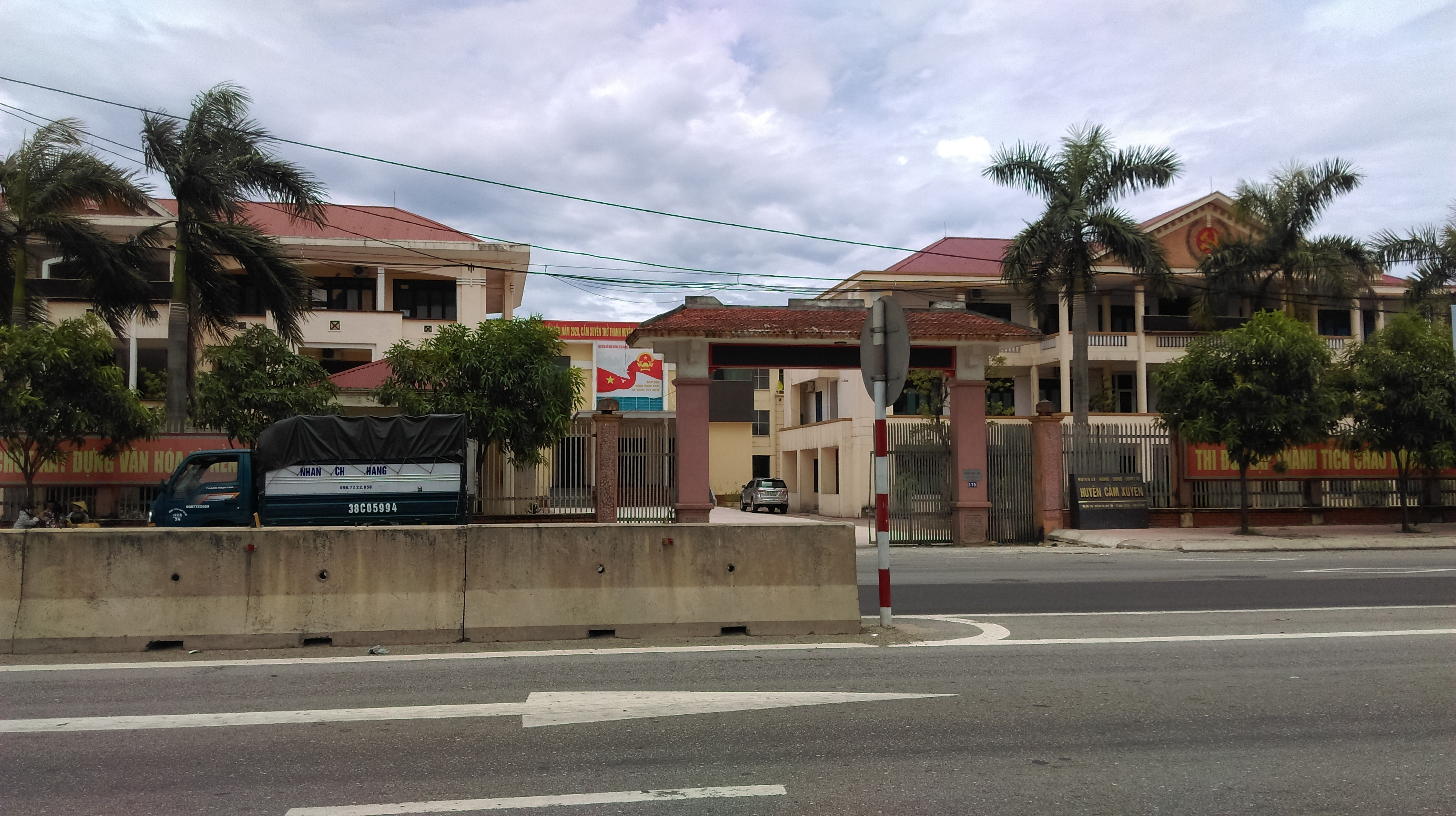 UBND huyện Cẩm Xuyên, Hà Tĩnh